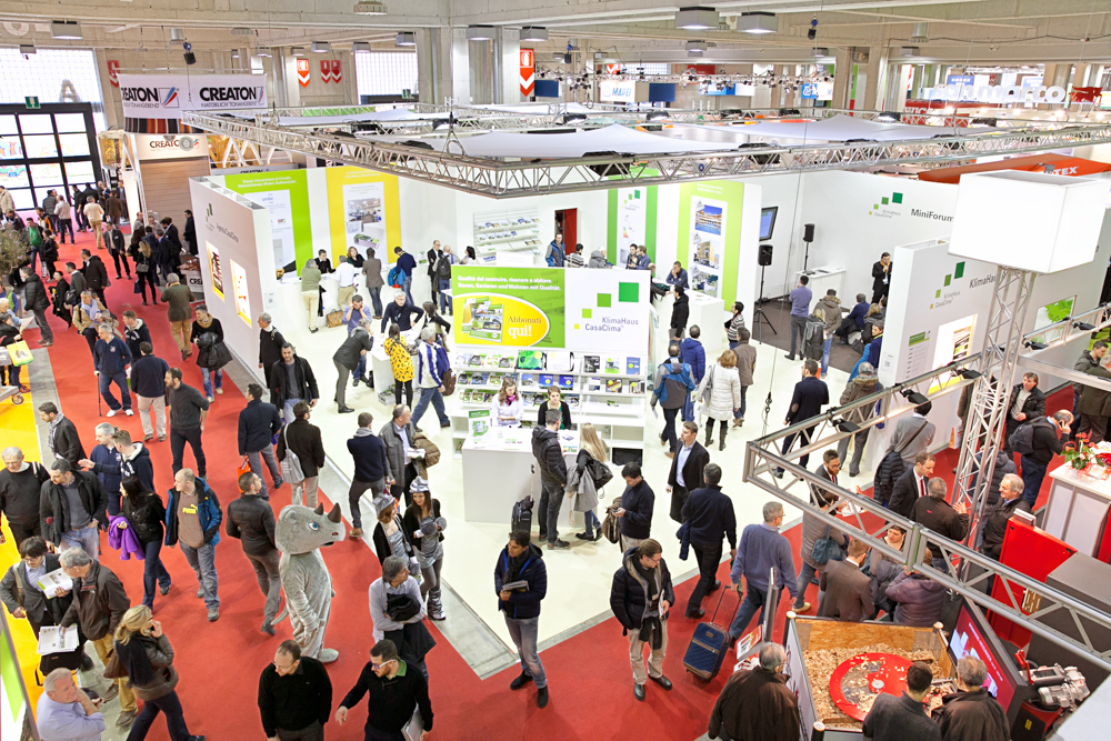 Messe Bozen: Einblick in die Messehalle.